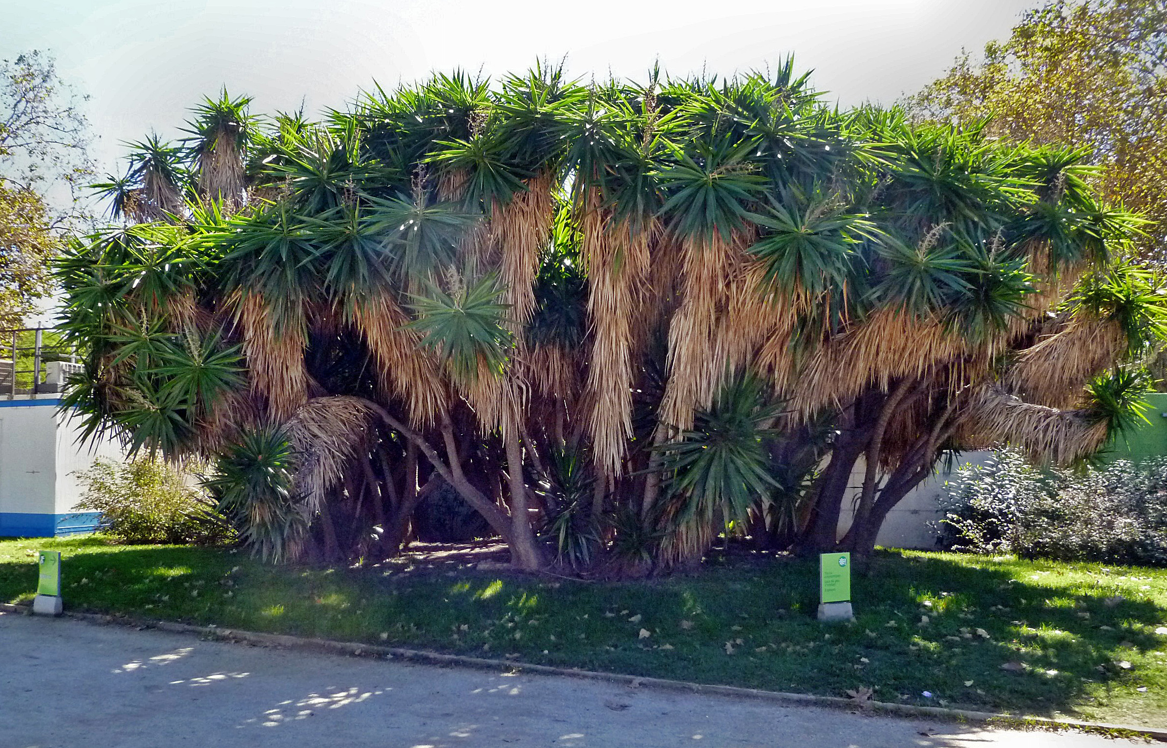 Yucca guatemalensis (syn Yucca elephantipes) in the Parc de la Ciutadella, Barcelona, Catalonia, Spain